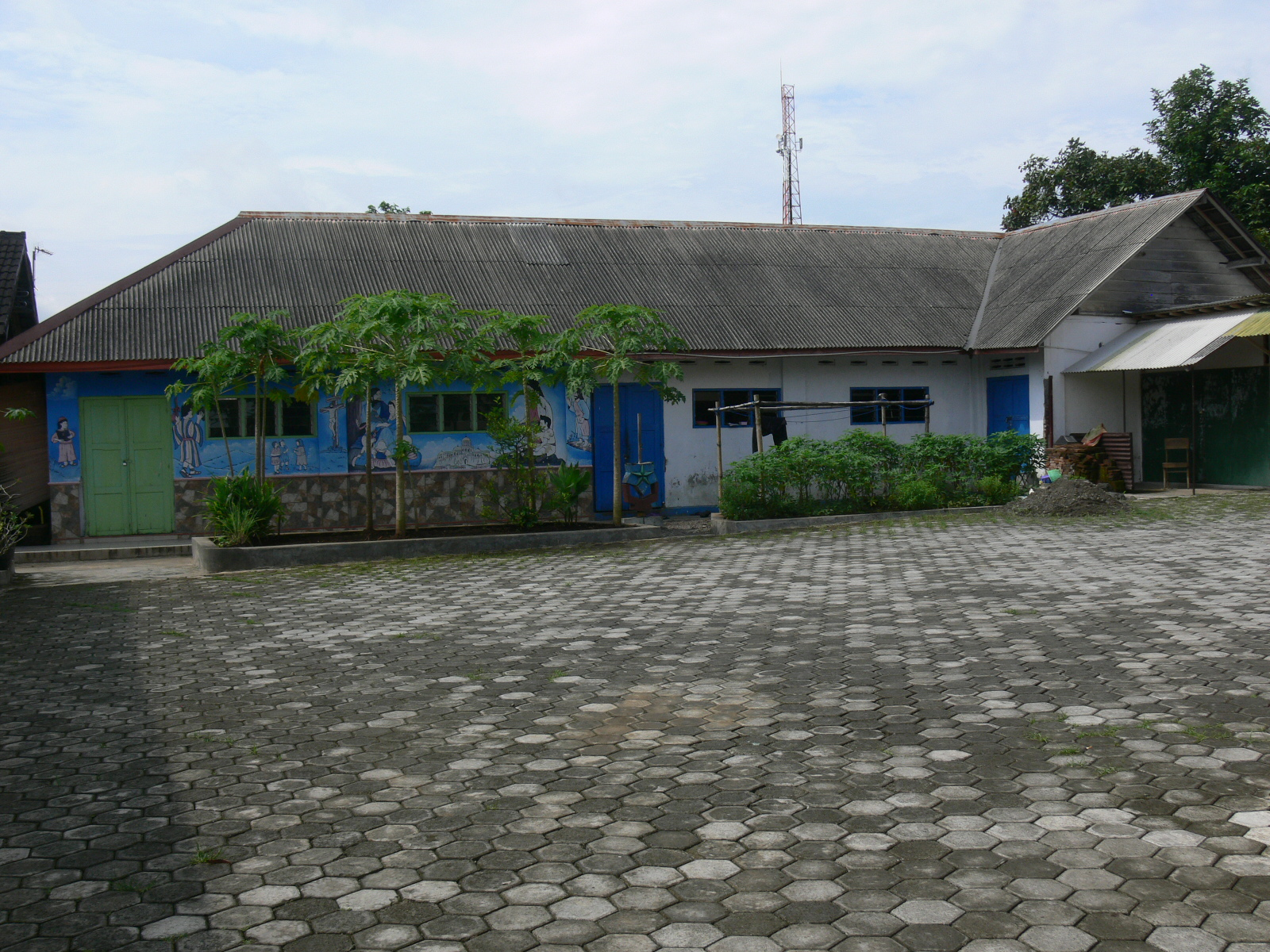 Gedung Asrama Putra